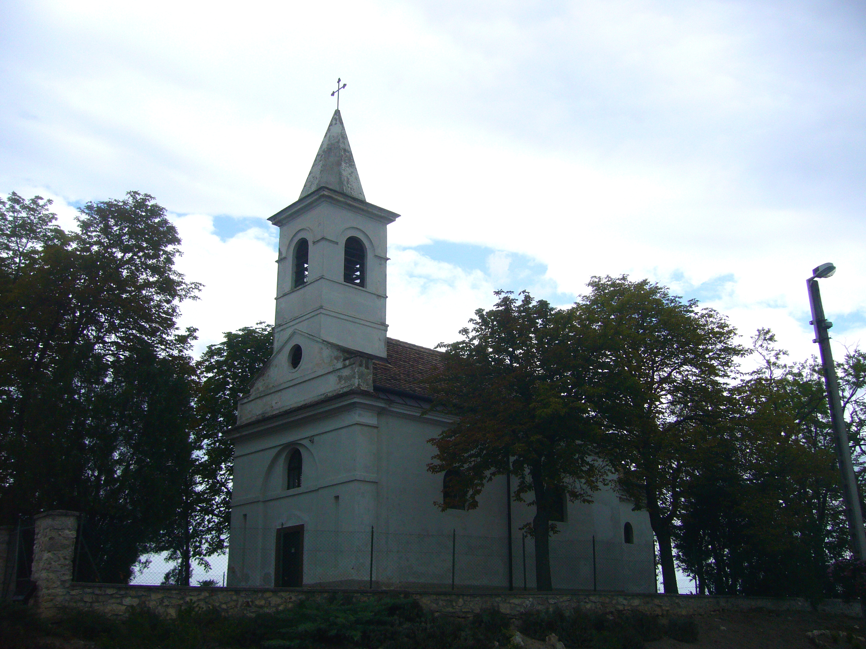 kat. templom.